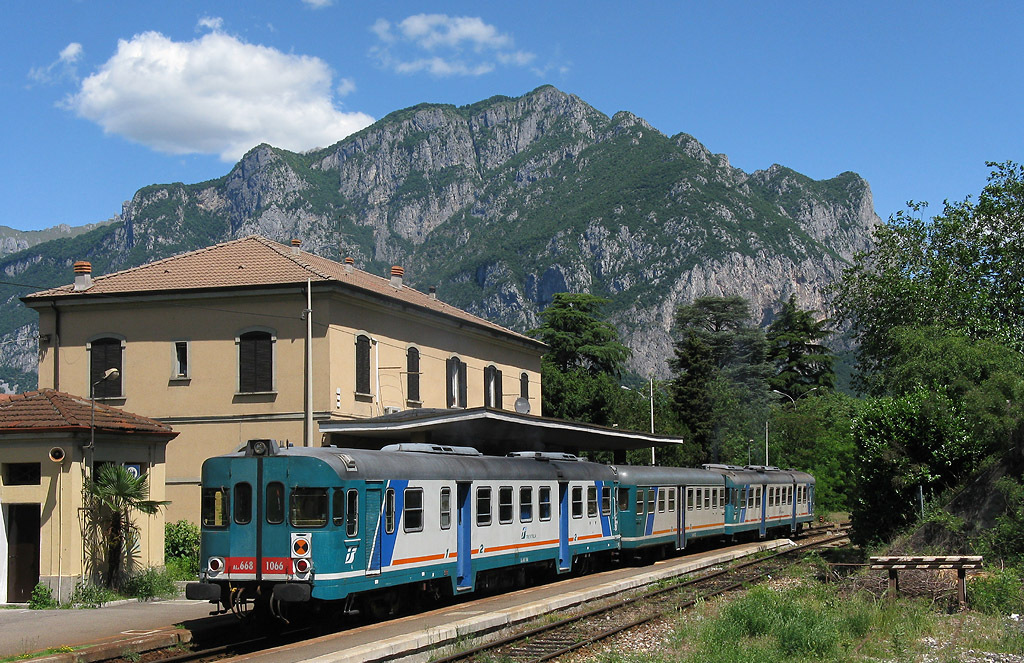 Stazione ferroviaria di Valmadrera. In sosta un treno di automotrici ALn 668 (in primo piano la 1066) inquadranti una rimorchiata Ln 664.